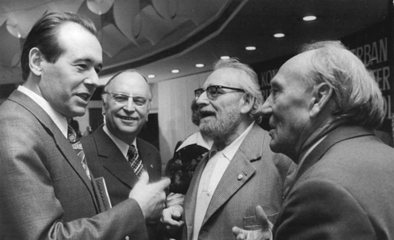 ADN-ZB Stark 30.11.75 Berlin: Theaterkongreß Lebhafte Gesprächsgruppen bestimmen das Bild in den Pausen des III. Kongresses des Verbandes der Theaterschaffenden der DDR, der am 30.11.75 in der Berliner Kongreßhalle seine dreitägigen Beratungen aufnahm. So unterhielten sich Joachim Herrmann, Kandidat des Politbüros des ZK der SED, Kurt Hager, Mitglied des Politbüros und Sekretär des ZK der SED, Prof. Wolfgang Heinz, Präsident des Verbandes der Theaterschaffenden der DDR, und Ernst Busch, der prominente Schauspieler und Sänger, (v.l.n.r.).